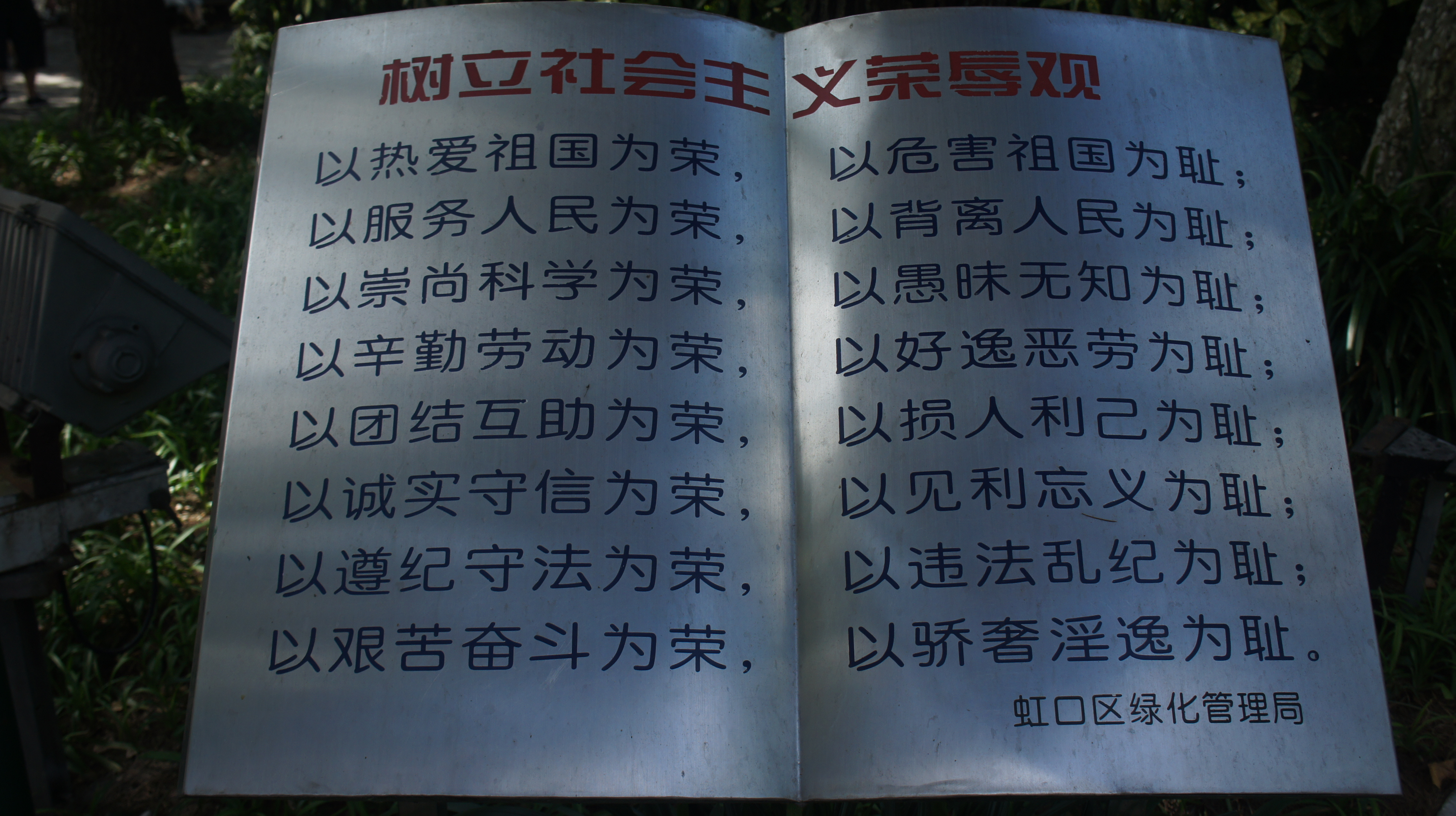 上海市鲁迅公园入园不远处的八荣八耻刻字雕塑